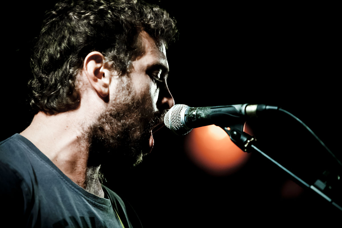 מתוך הופעה בתיאטרון תמונע